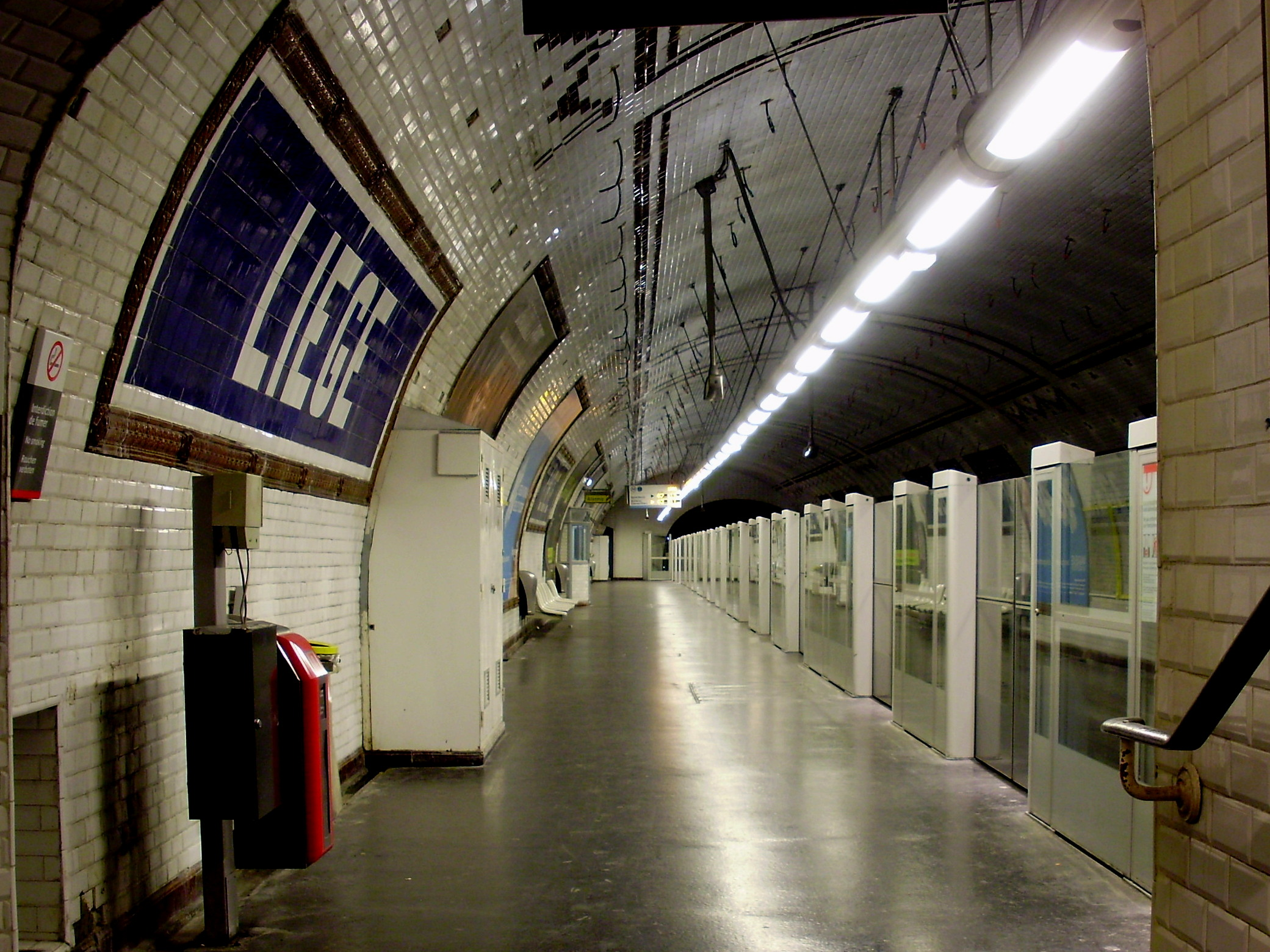 Station Liège du métro de Paris, France : quai doté de portes palières, en direction du nord de la ligne 13 (vers Asnières et Saint-Denis).